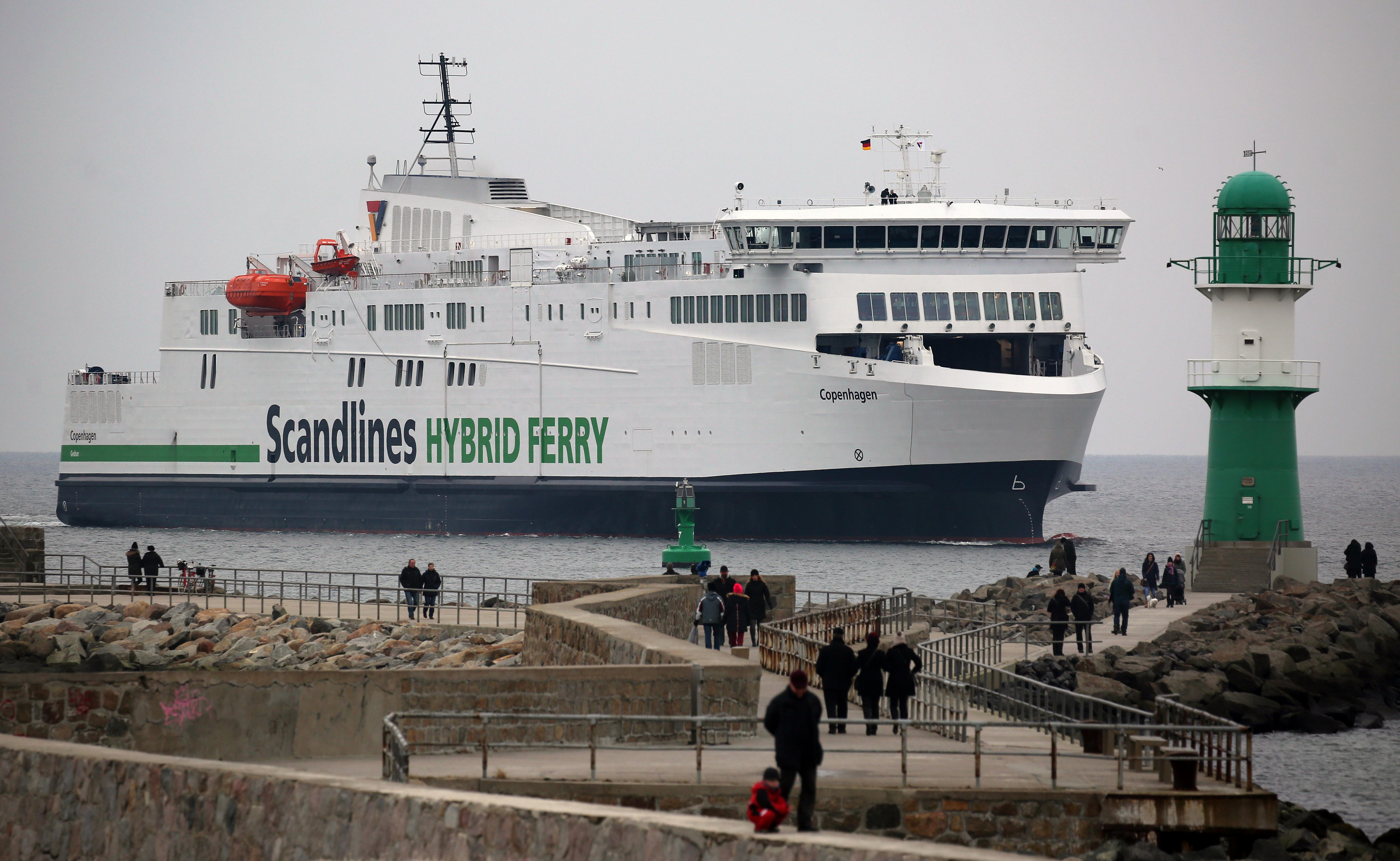 Die Scandlines-Fähre "Copenhagen" beim Einlaufen in Rostock-Warnemünde